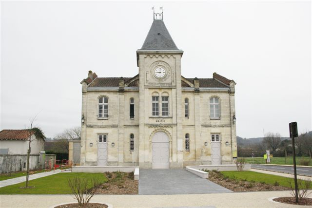 La mairie de Saint Antoine de Breuilh après restauration en 2014